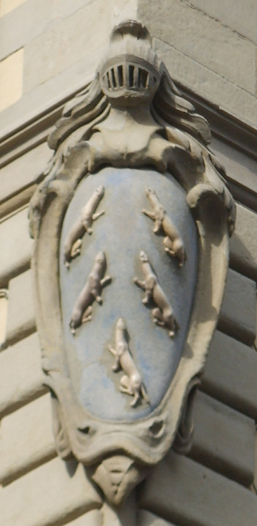 Palazzo vecchietti 04 stemma2